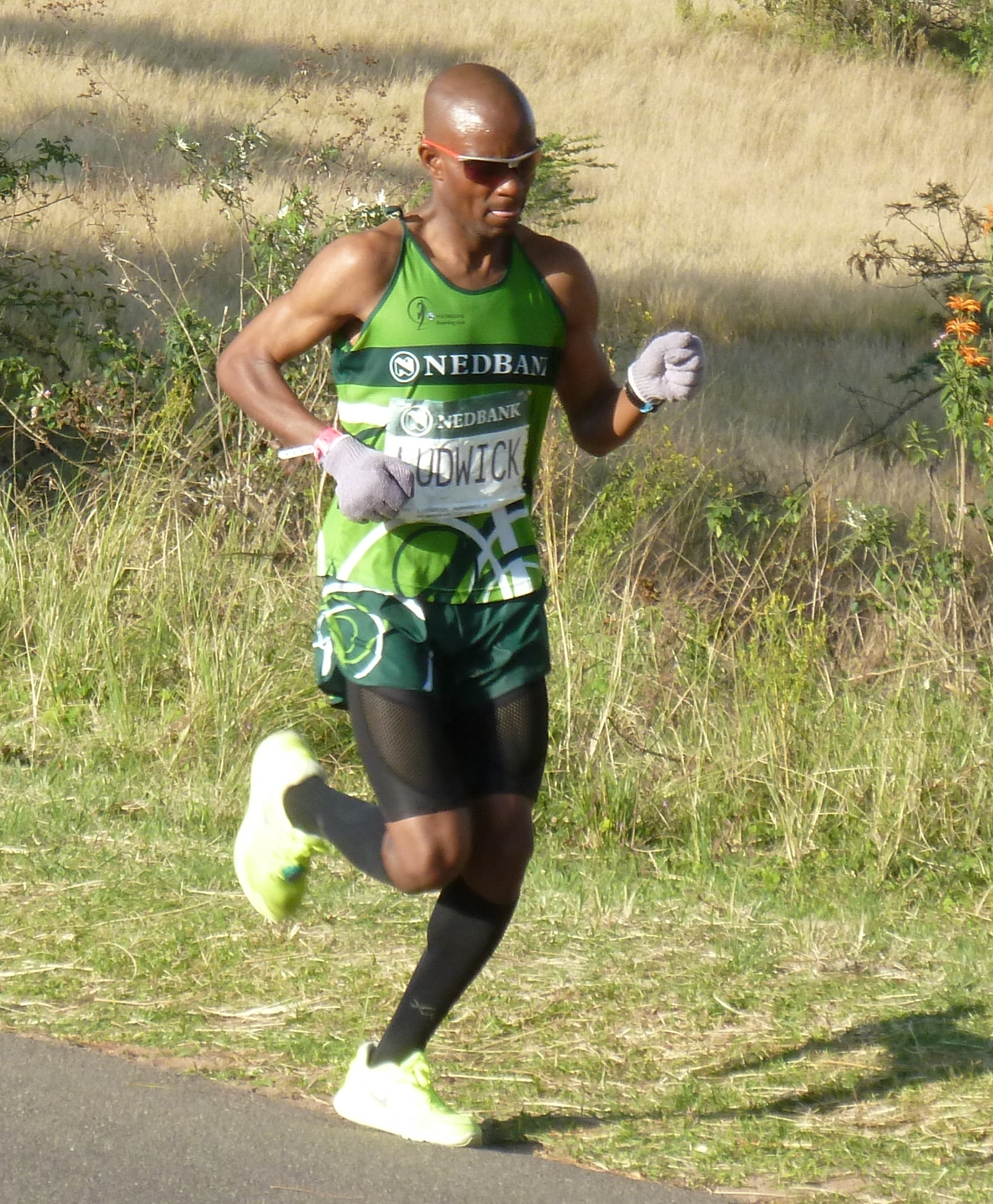 Ludwick Mamabolo bereik die 50 km-merk in die 2013 Comrades marathon waar hy in 4de plek eindig in 'n tyd van 5:45:48.